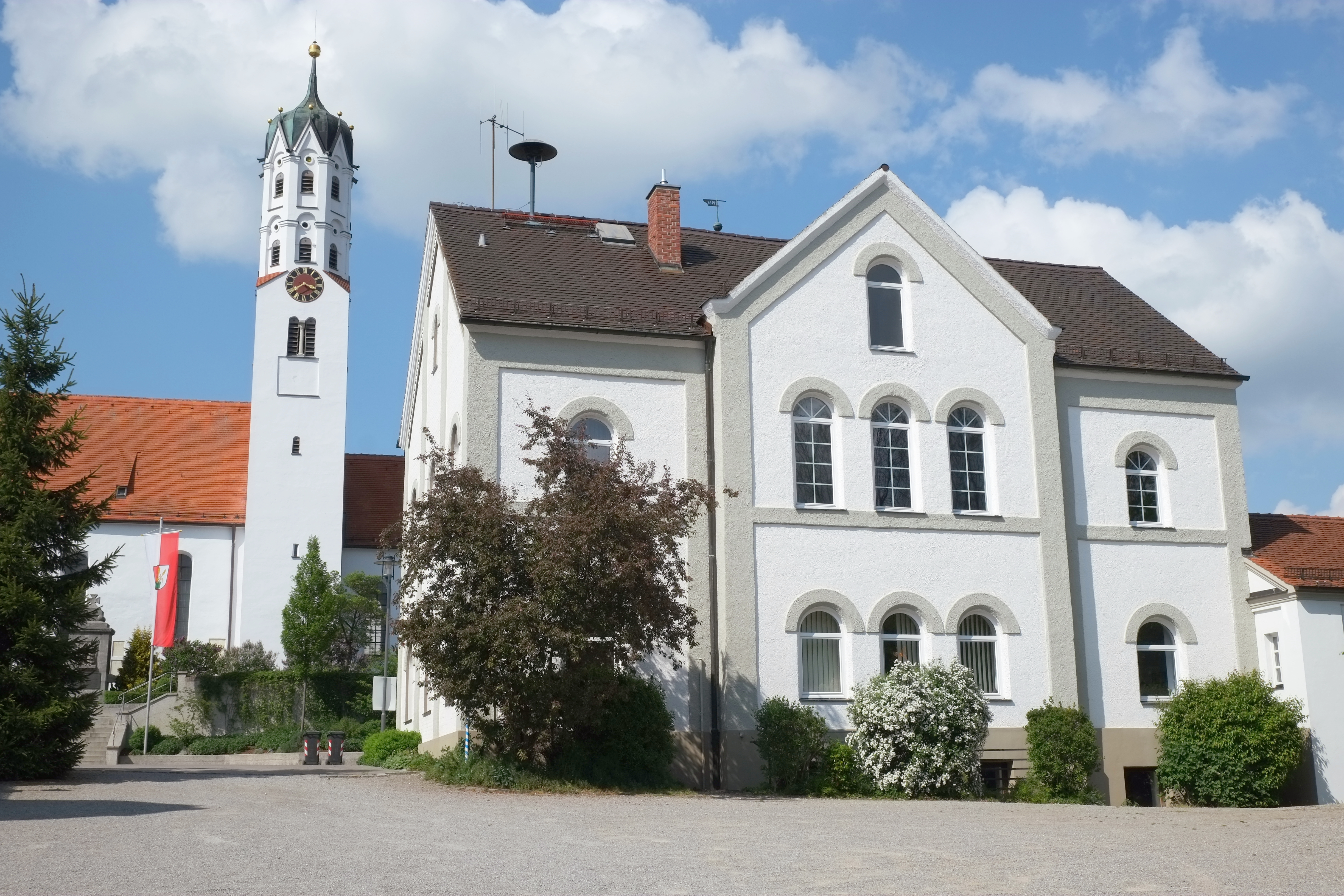 Rathaus in Dinkelscherben im Landkreis Augsburg (Bayern, Deutschland)